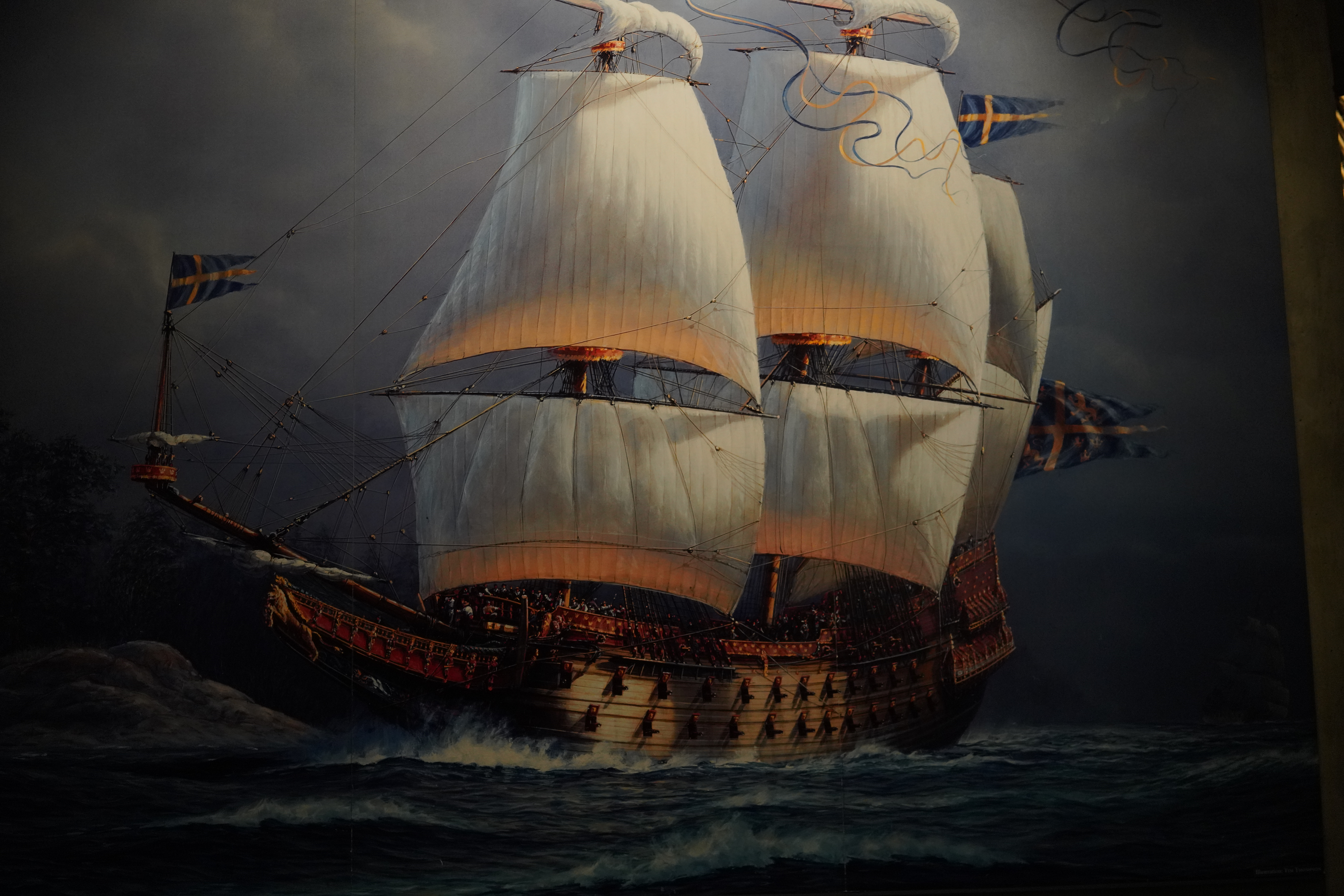 20180623_Vasa_6657